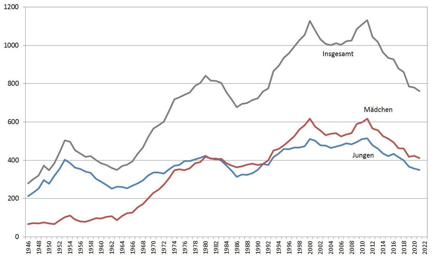 Schülerzahlen insgesamt und männlich/weiblich am Luitpold-Gymnasium Wasserburg am Inn - Bayern - Deutschland